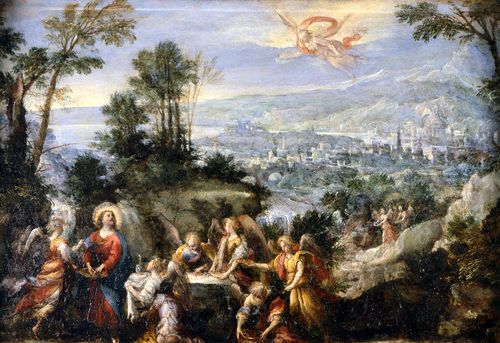 Cristo servido por los ángeleslabel QS:Les,"Cristo servido por los ángeles"